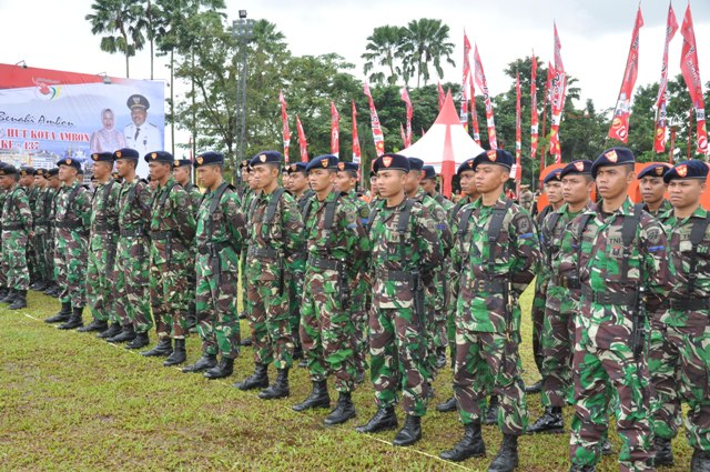 Prajurit Lantamal IX mengikuti upacara HUT Kota Ambon.